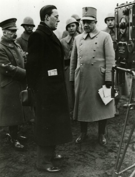 Een bezoek van Prins Bernhard aan een oefening van de luchtafweer in Terschuur nabij Barneveld. Hier een uitleg van het vuurleidingsapparaat behorende bij het 7,5 cm Vickers luchtdoelgeschut. Op de foto vlnr Luitenant-Generaal W. Roell, commandant veldleger, Prins Bernhard en Luitenant-Kolonel A.J. Maas. Ook de commandant van het korps luchtdoelartillerie Kolonel ridder van Rapard was hierbij aanwezig.